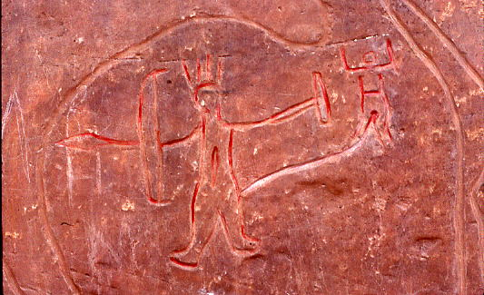 Gravure préhistorique du sud oranais, Thyout, Algérie